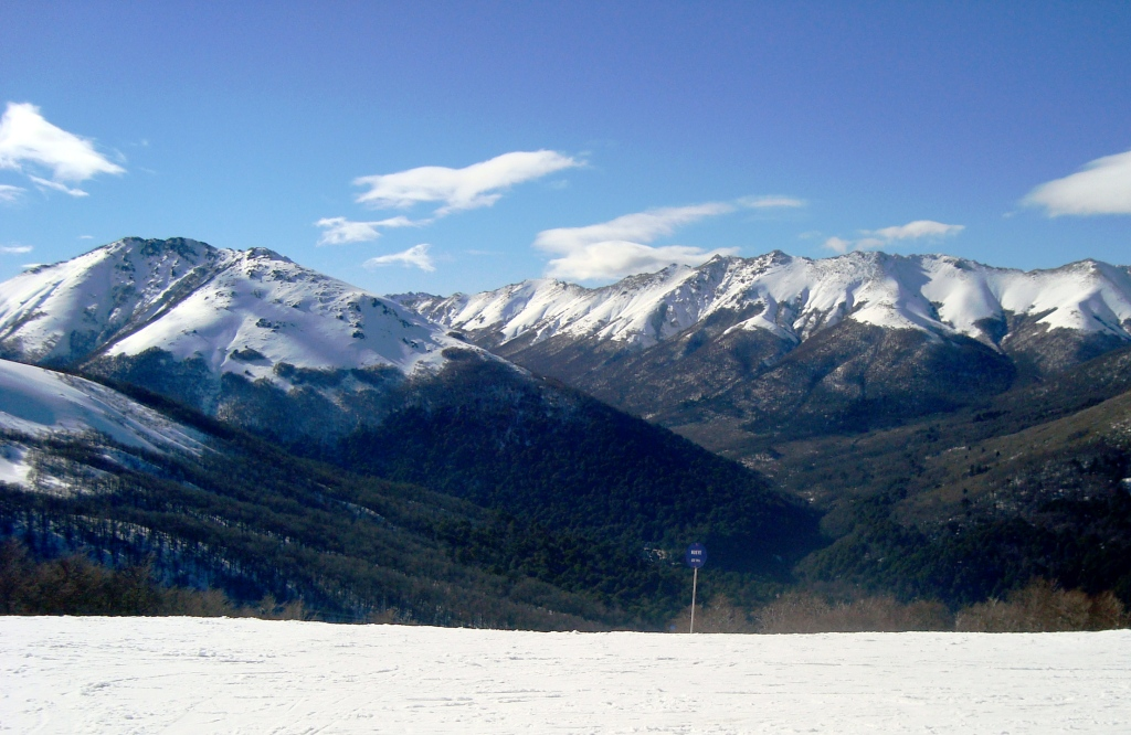 Villa la angostura hoy pista con vista panoramica